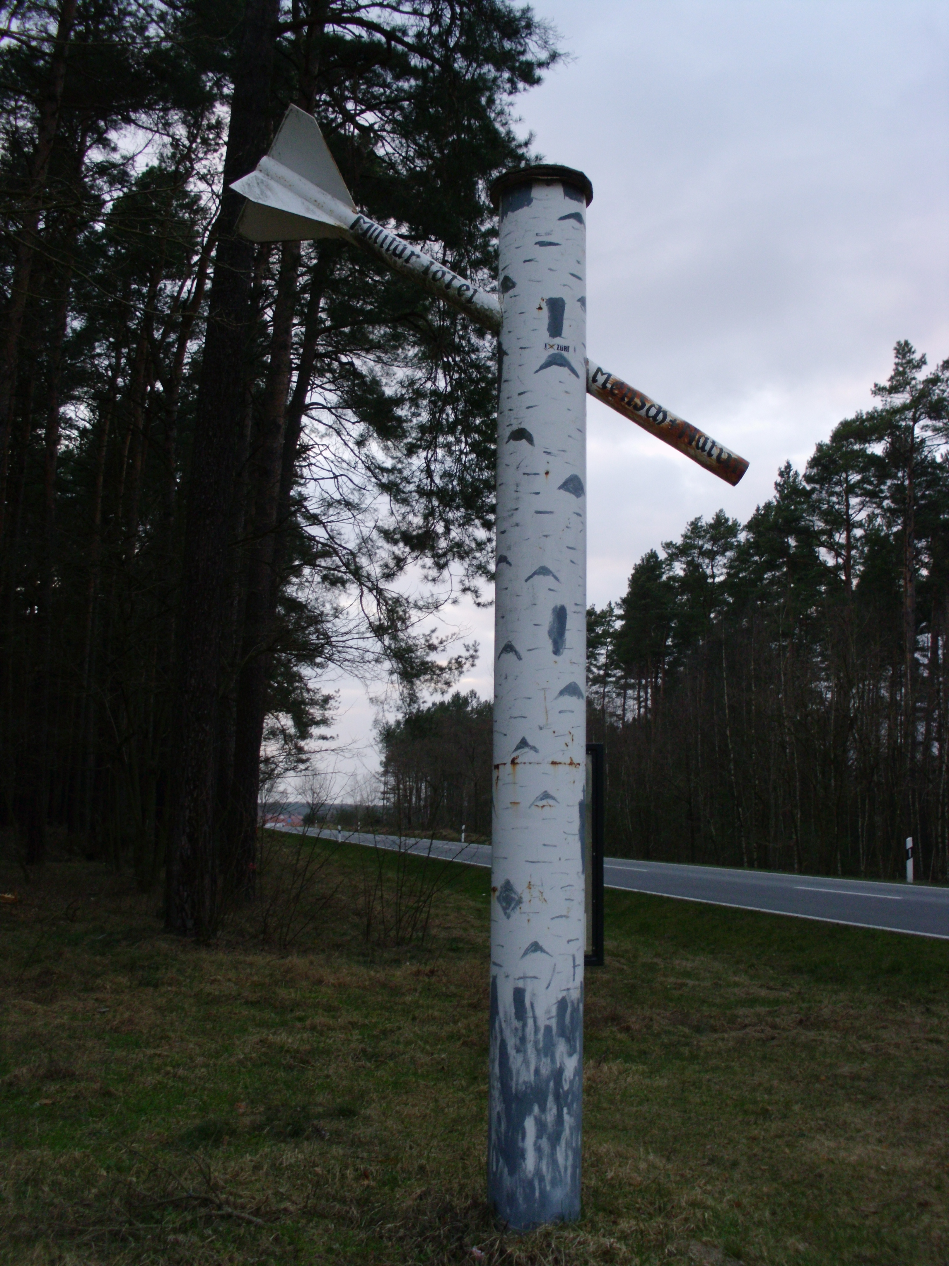 Schweinricher Mahnsäule, aufgestellt anläßlich des 50. Protestmarsches am 5. September 1998 der Initiative FREIeHEIDe durch den Bremer Aktionskünstler Joachim Fischer. Nachdem der Birkenstamm mehrfach zerstört wurde, erfolgte eine Rekonstruktion. Die Wiedereinweihung des heutigen Kunstwerkes erfolgte am 1. Januar 1999 anläßlich des 52. Protestmarsches. Zugegen waren unter anderem Frau Dr. Regine Hildebrandt (1941-2001), der Liedermacher Gerhard Schöne, das damalige Mitglied des Deutschen Bundestages Ernst Bahr.